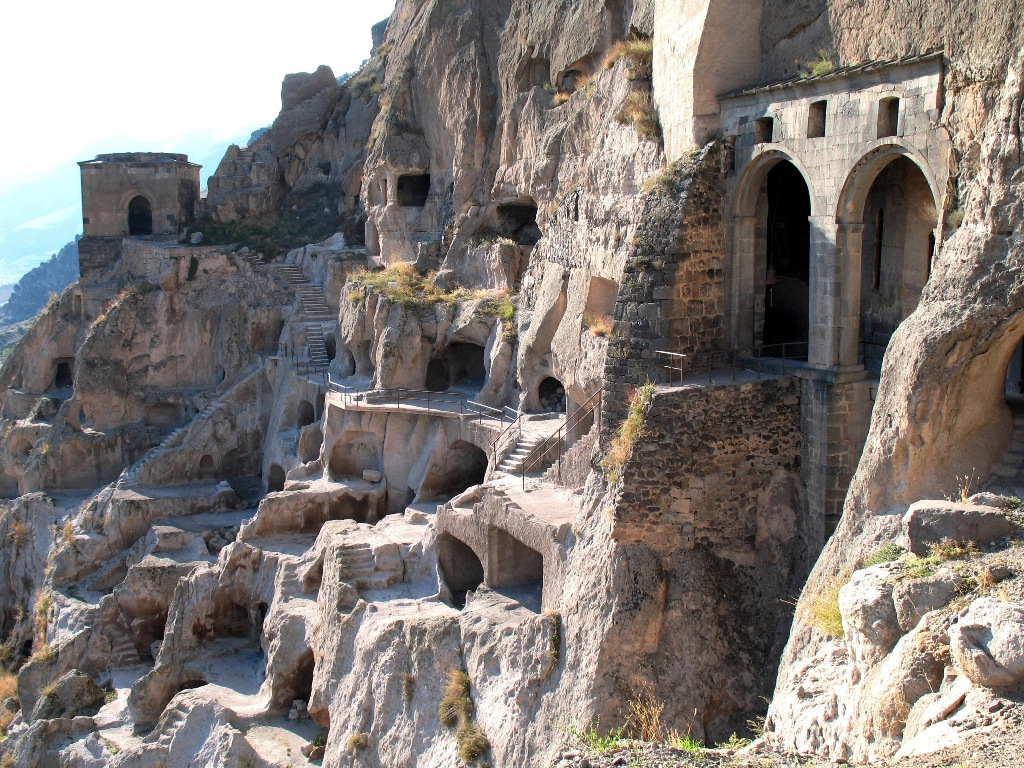 Vardzia